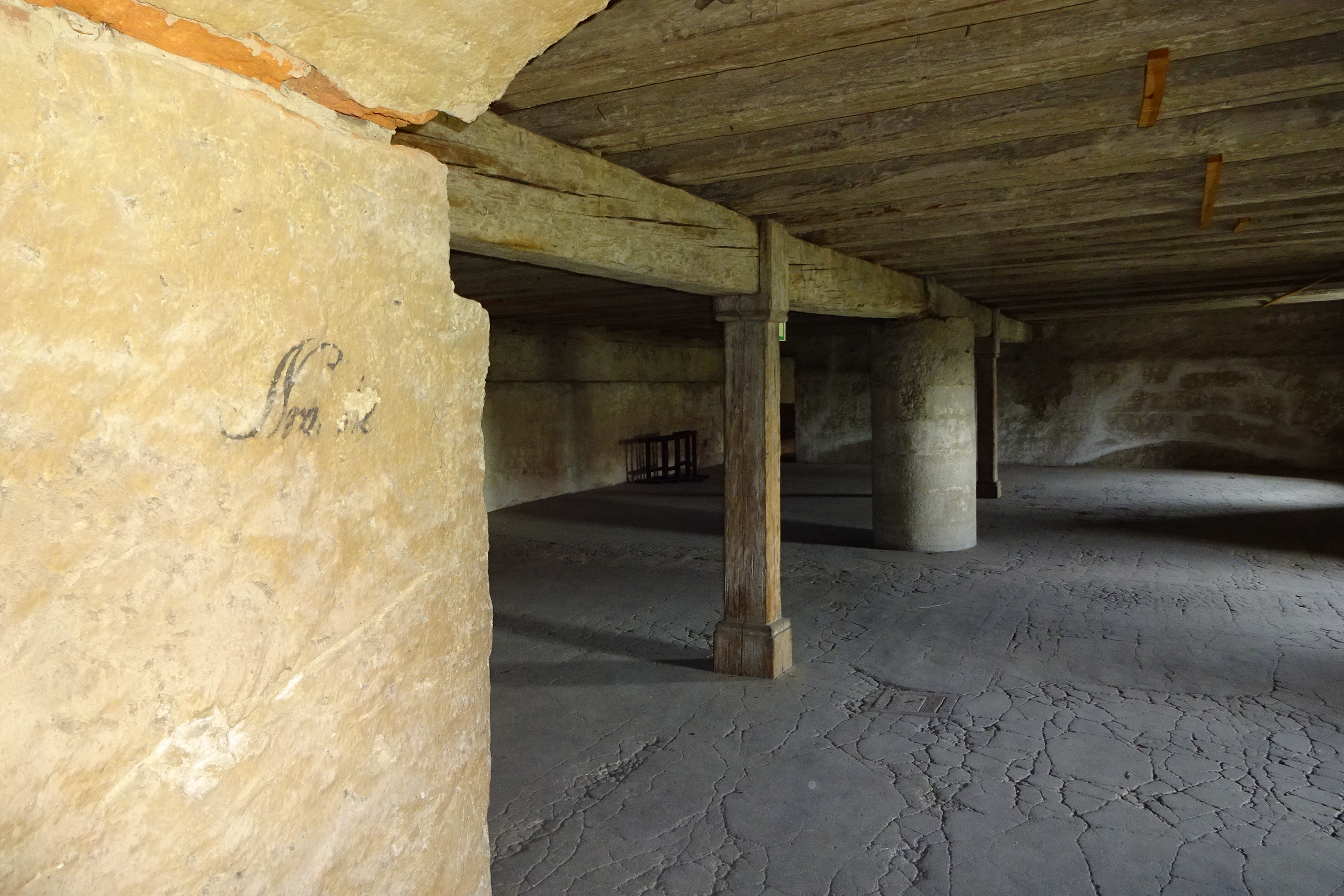 Höchstadt Aisch Schloss Dachgeschoß